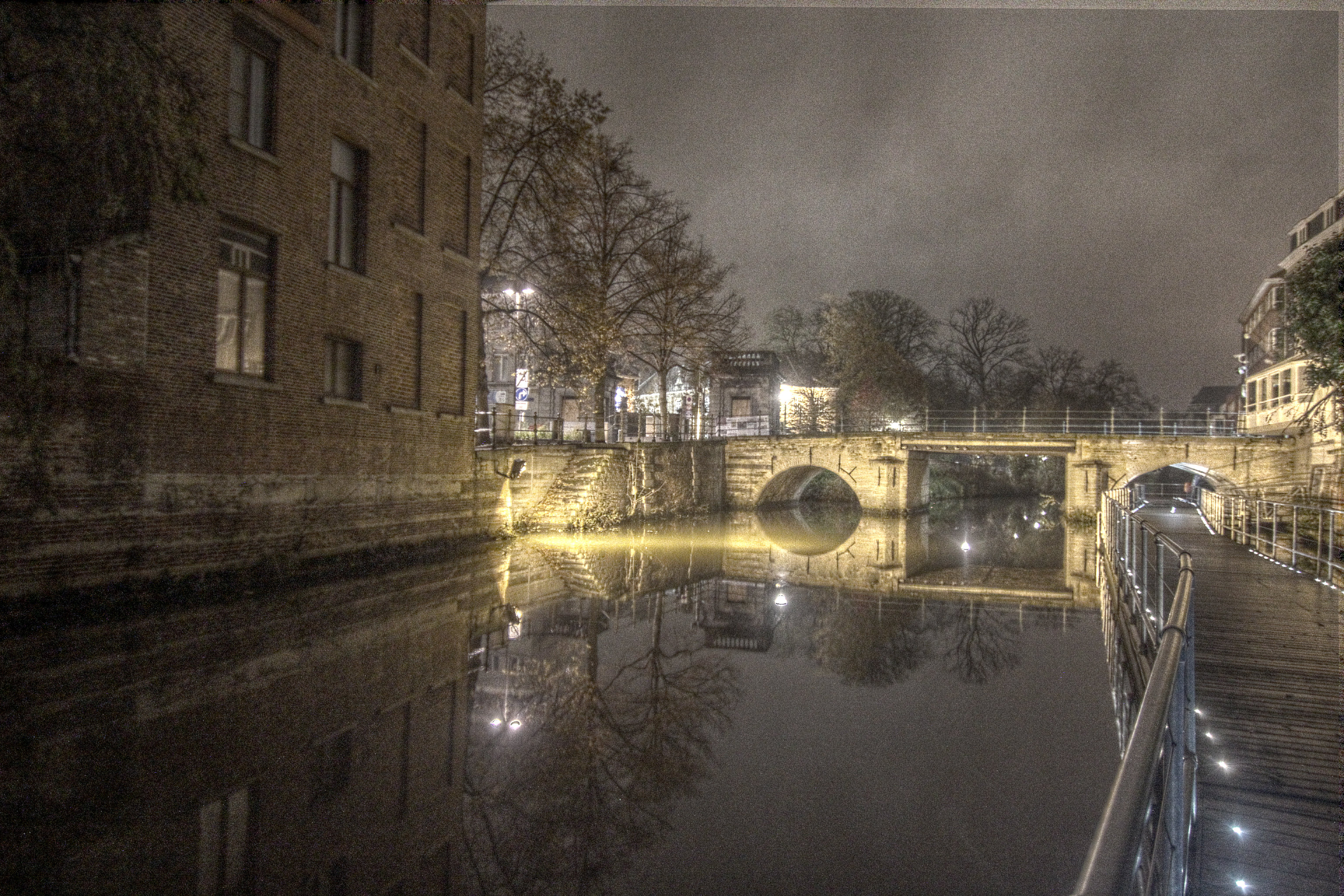 De Fonteinbrug in Mechelen des avonds laat, 18 november 2014